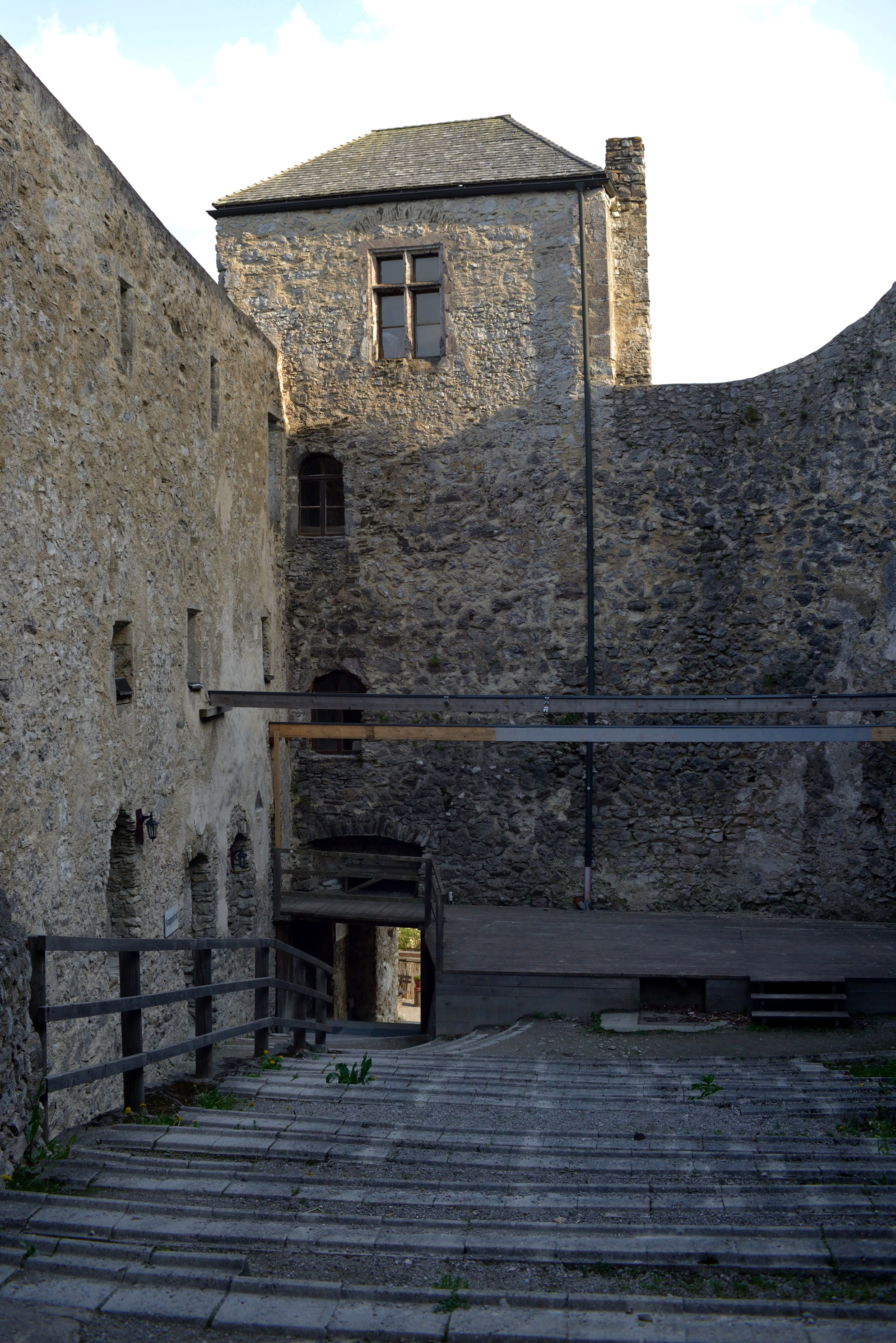 Bühne auf der Araburg